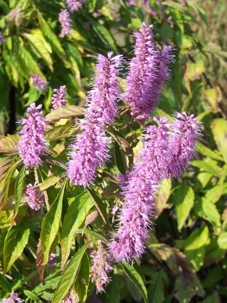 Elsholtzia stauntonii, Ogród Botaniczny UW w Warszawie